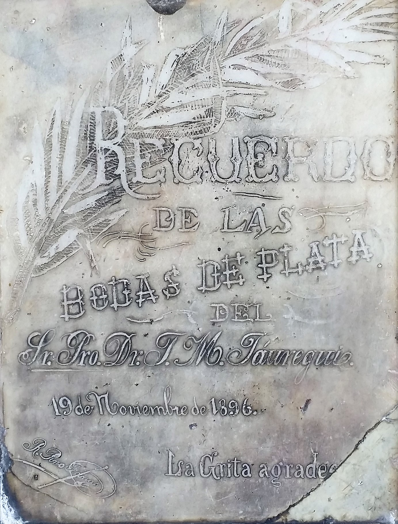 Placa conmemorativa a Jesús Manuel Jáuregui por sus Bodas de Plata sacerdotales. La Grita, 19 de noviembre de 1896